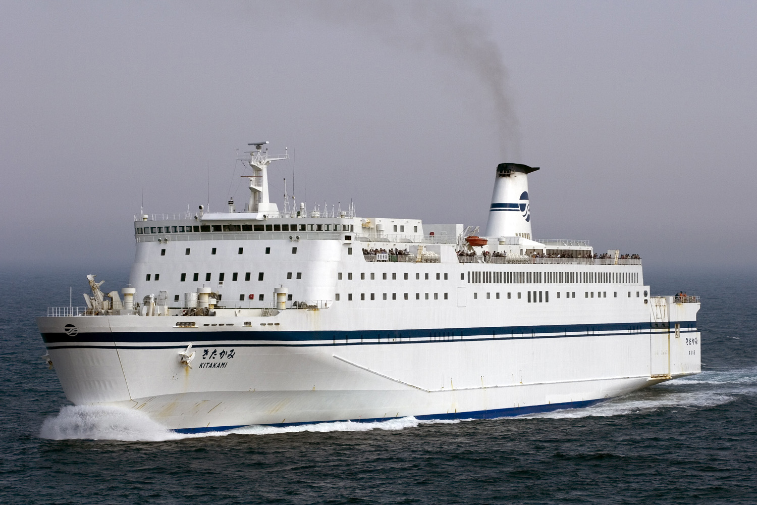 太平洋フェリー「きたかみ」（福島県相馬市沖）